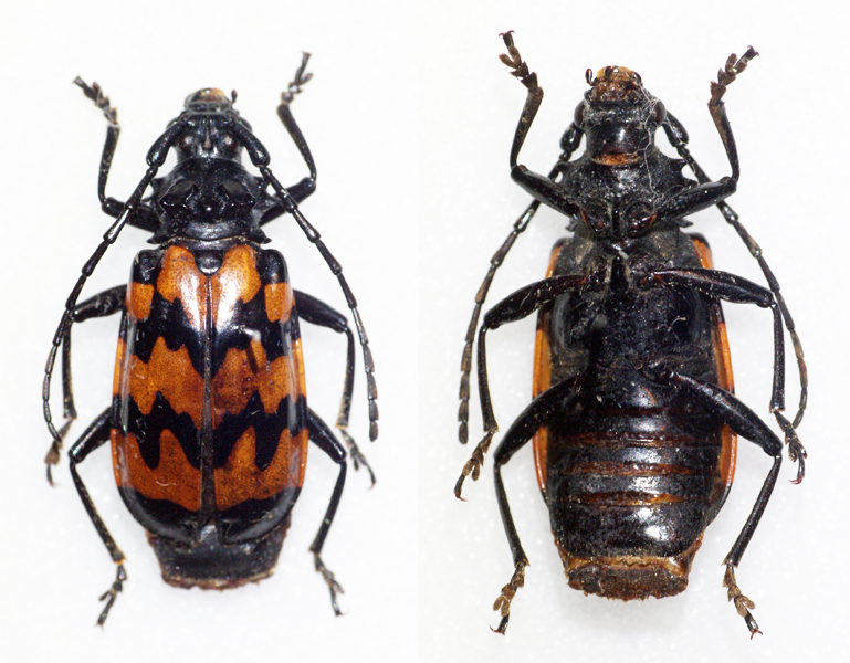 Olivier,1795 Sex: Female Data: 24-10-06 - Kaw - French Guiana Size: ?